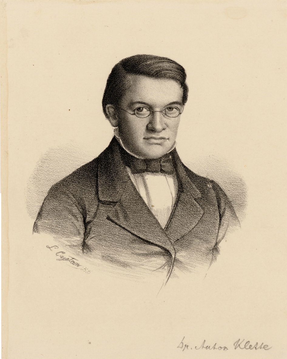 Anton Klette (1834–nach 1879), deutscher Klassischer Philologe und Bibliothekar